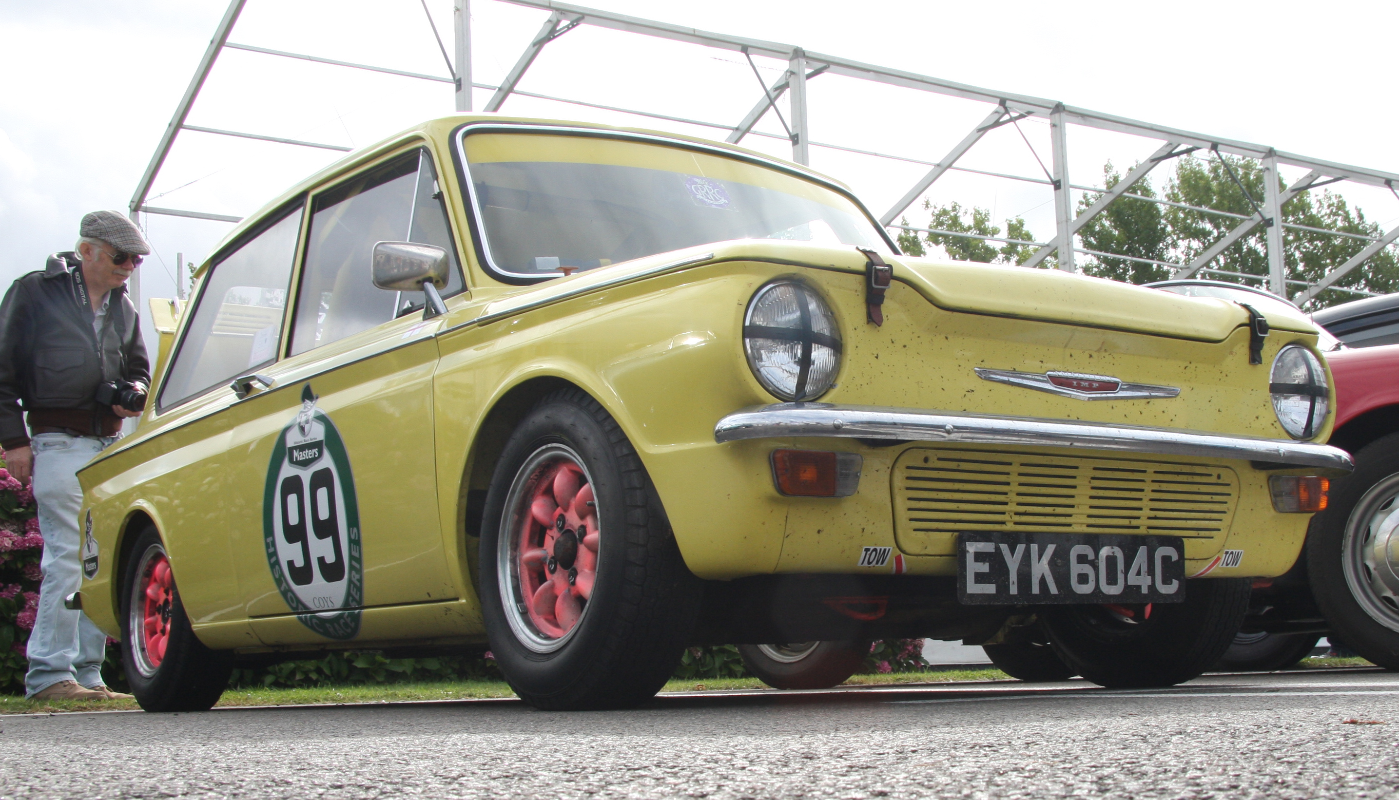 Hillman Imp